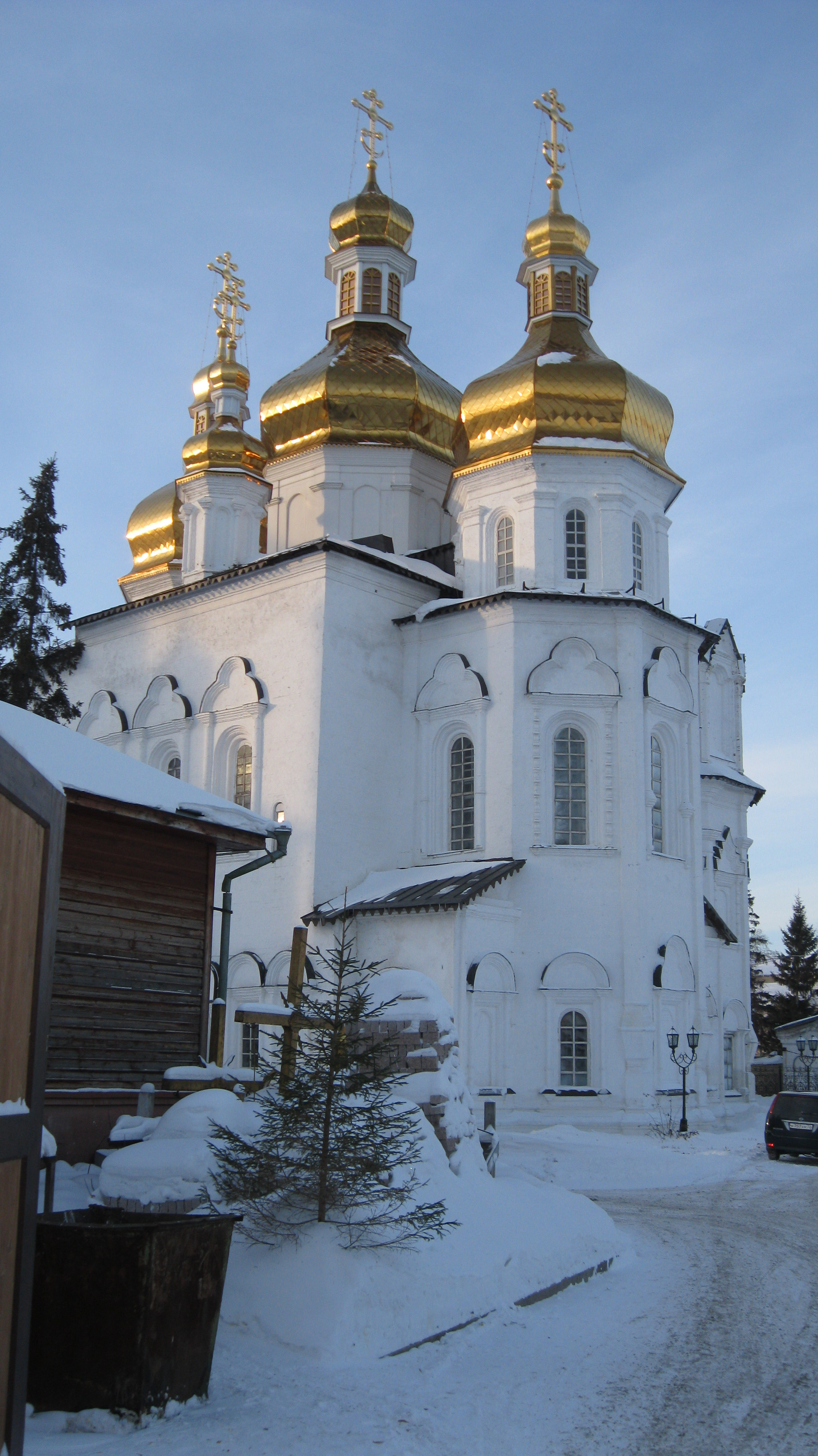 Собор Троицы Живоначальной Троицкого монастыря в Тюмени (вид с восточной стороны)